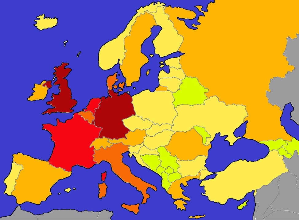 Diese Karte zeigt an, wo die meisten (dunkelrot) und wo die wenigsten (grün) leben.